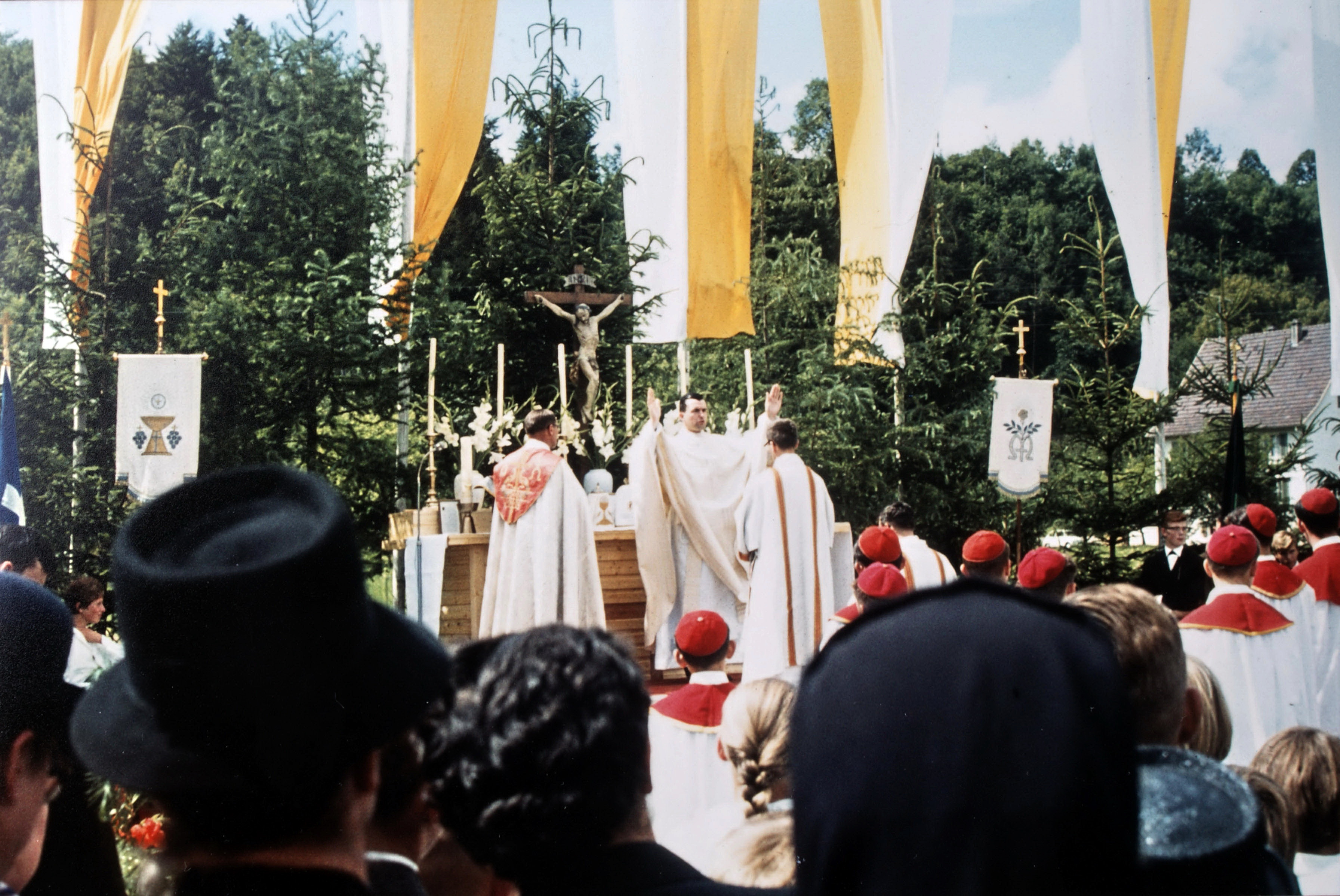 Veringenstadt 1963. Primiz von Karl Lehmann später Kardinal in Mainz und Vorsitzender der deutschen Bischofskonferenz. Die Konzelebranten waren Pfarrer Friedolin Abberger und Pfarrer Friedolin Fink.